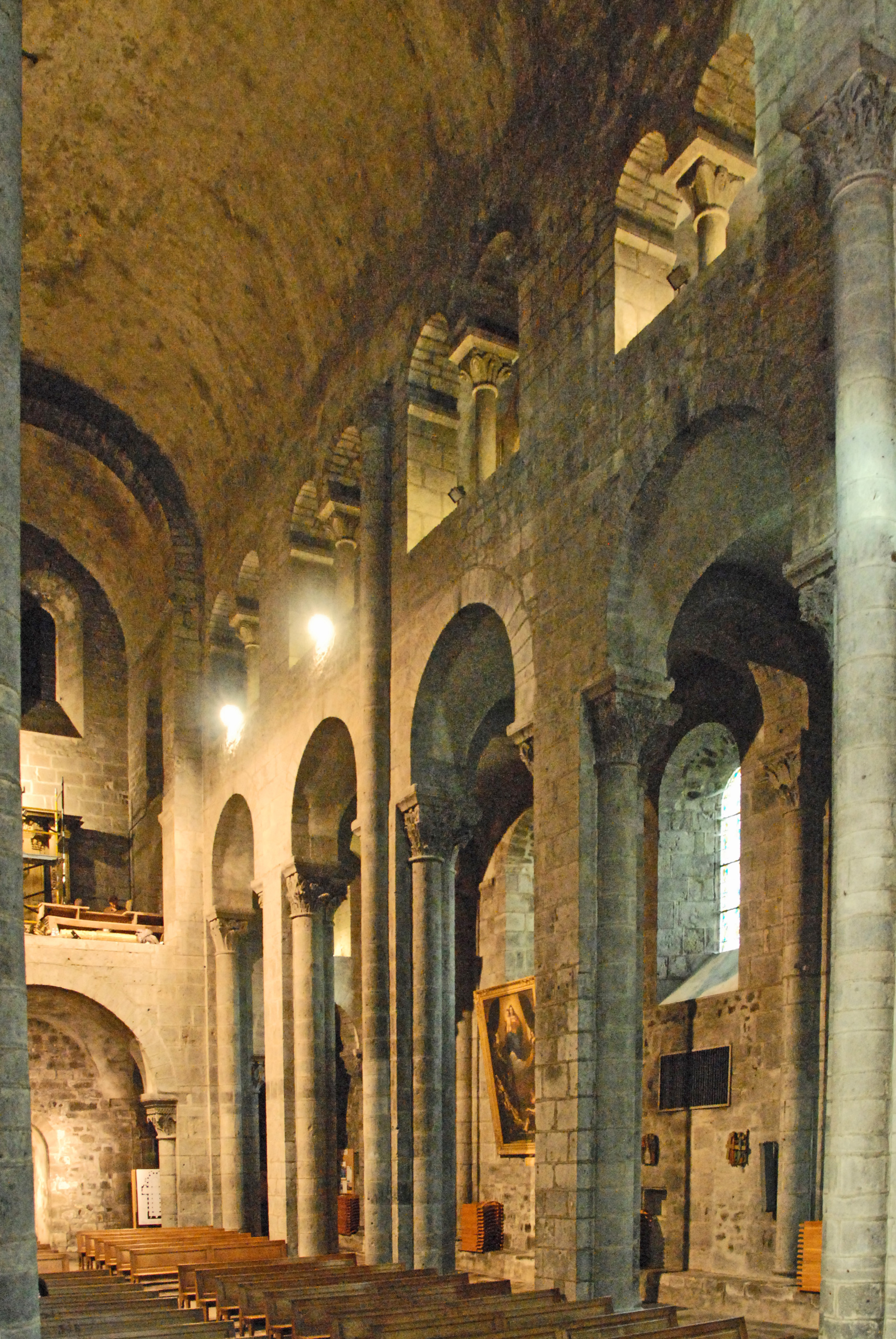 N.-D. d'Orcival, Mittelschiff, Nordwand Joche 1-4